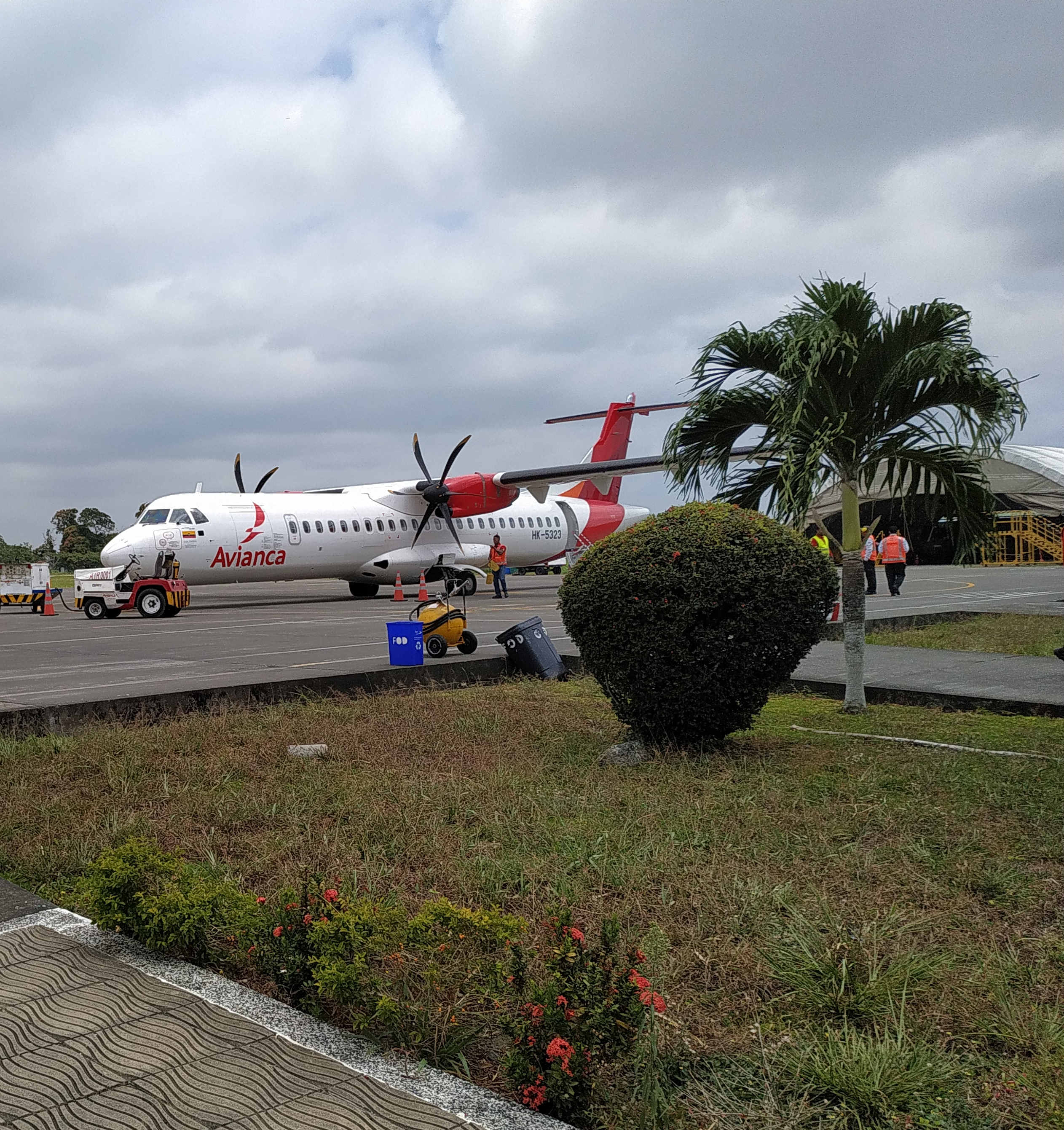 Atr 72 en el Aeropuerto La Florida